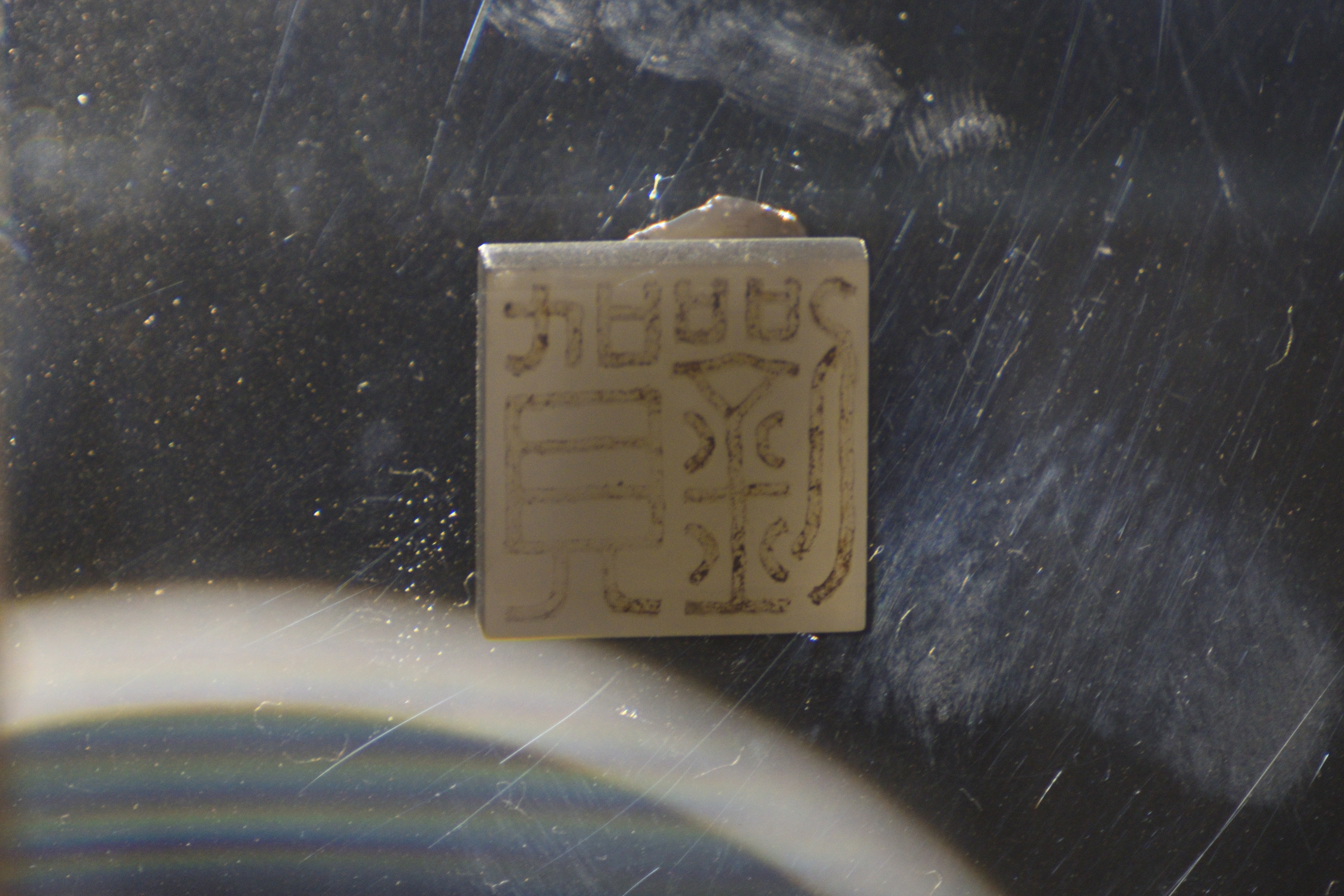 海昏侯墓出土刘贺私印（印文）